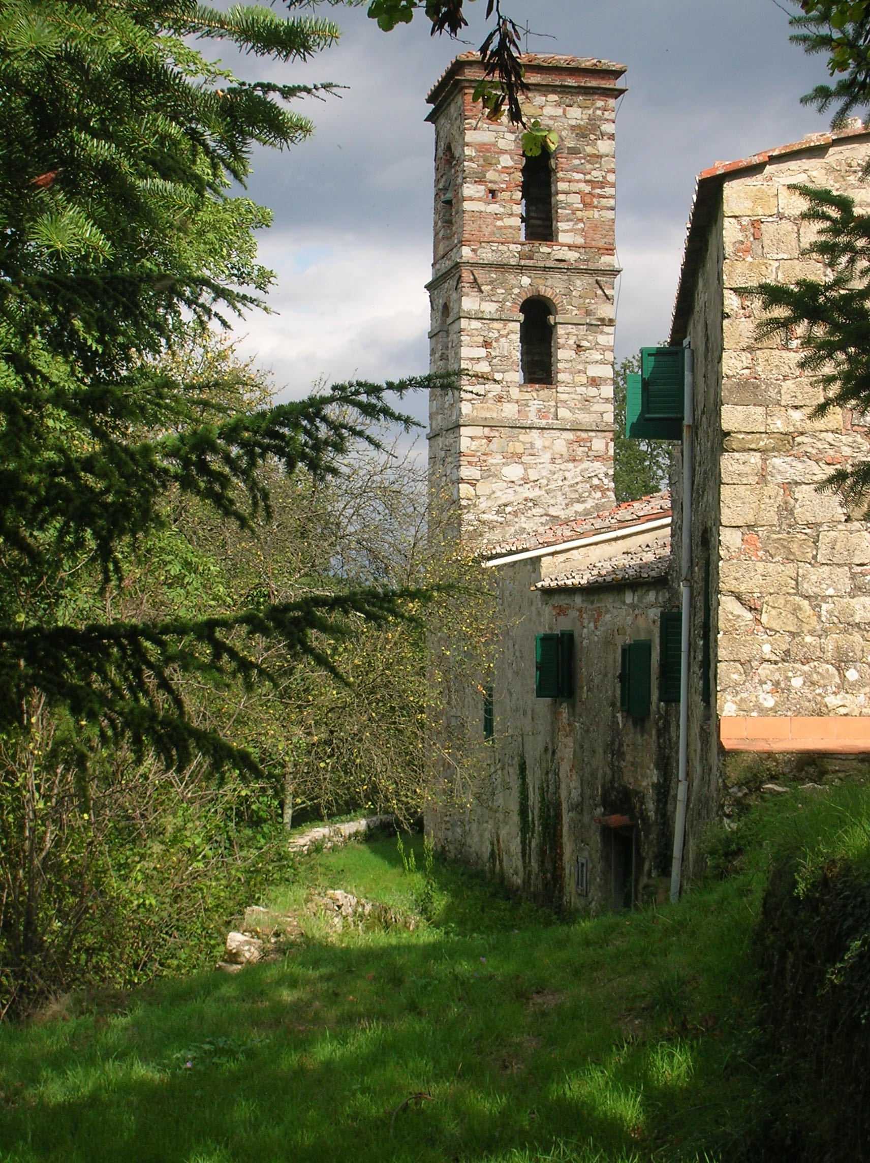 foto dell'abbazia di spugnole